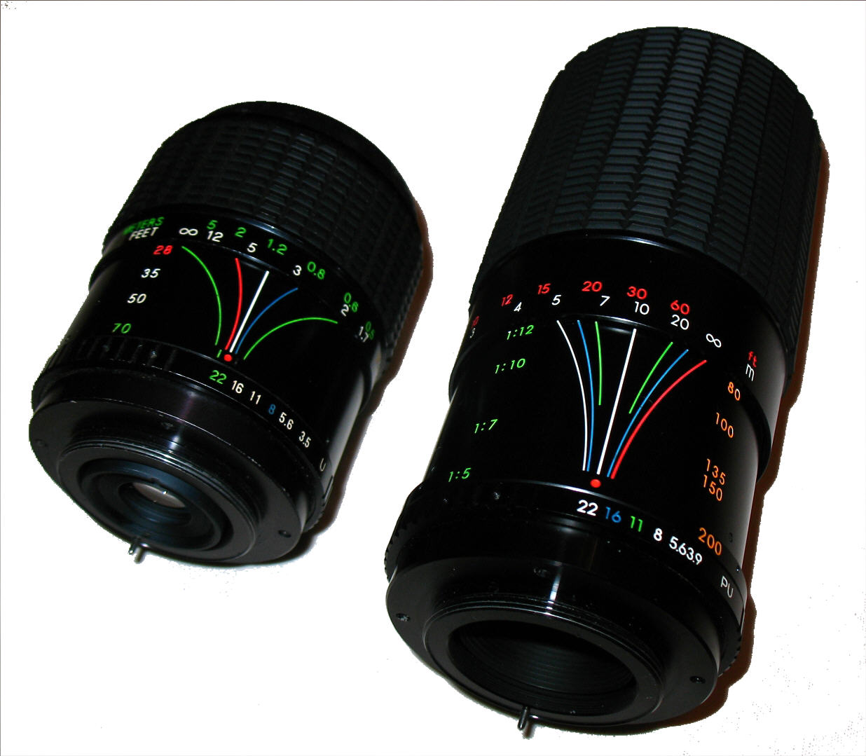 Blendenkurven an manuellen Zoomobjektiven (li: Prakticar 28-70mm 3,5-4,5; re:Beroflex 80-200mm 3,9-4,5)